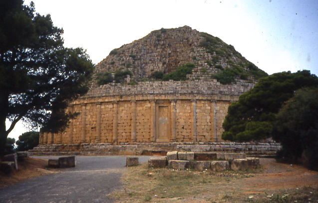 Mausolée royal de Maurétanie, Algérie